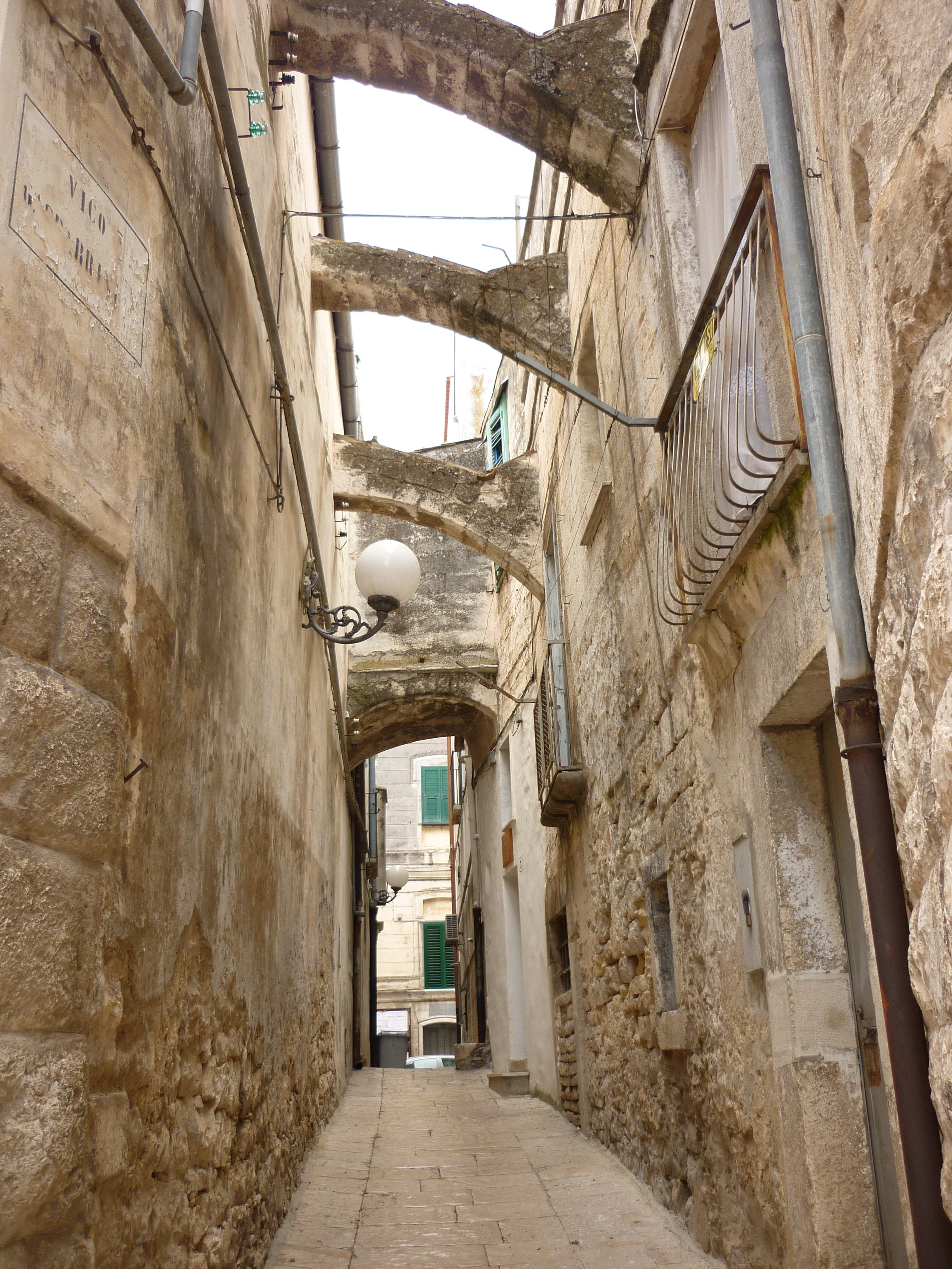 Minervino Murge, BT. Centro Storico.